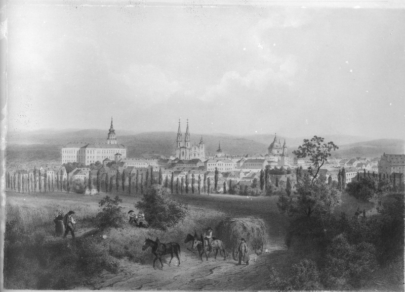 Kroměříž v polovině 19. století, litografie Augusta Hauna podle kresby Franze Kaliwody